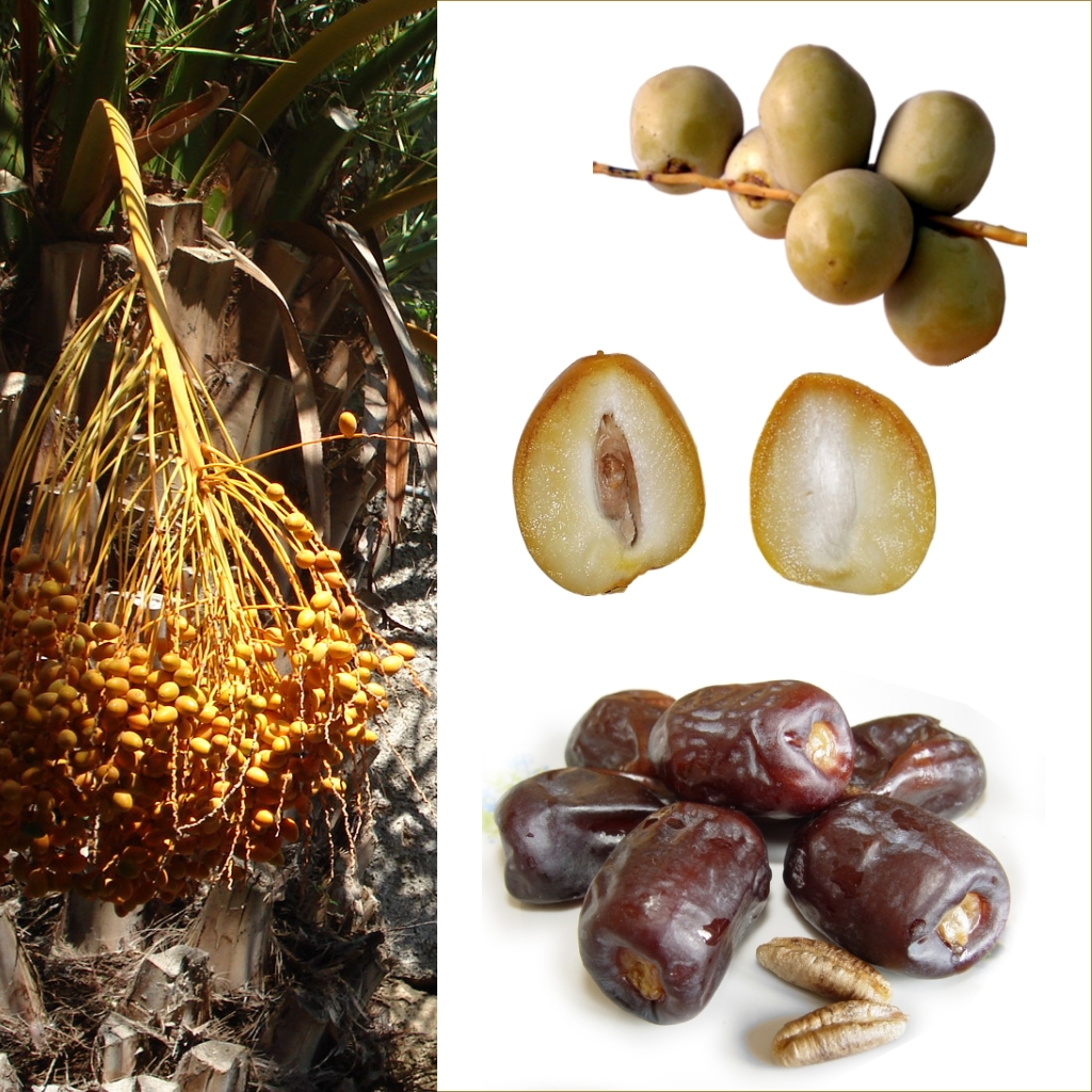 Grafika podręcznika Wikijunior:Owoce. Daktyl - daktylowiec właściwy (Phoenix dactylifera).